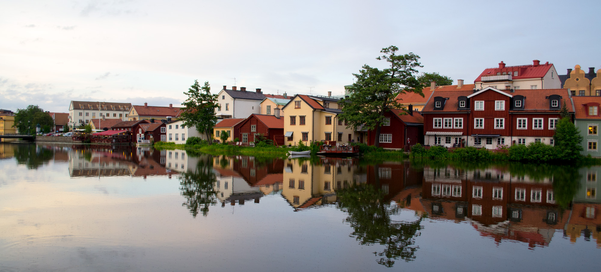 Eskilstunas gamla stad reflekterad av vattnet i ån som rinner vackert genom staden.